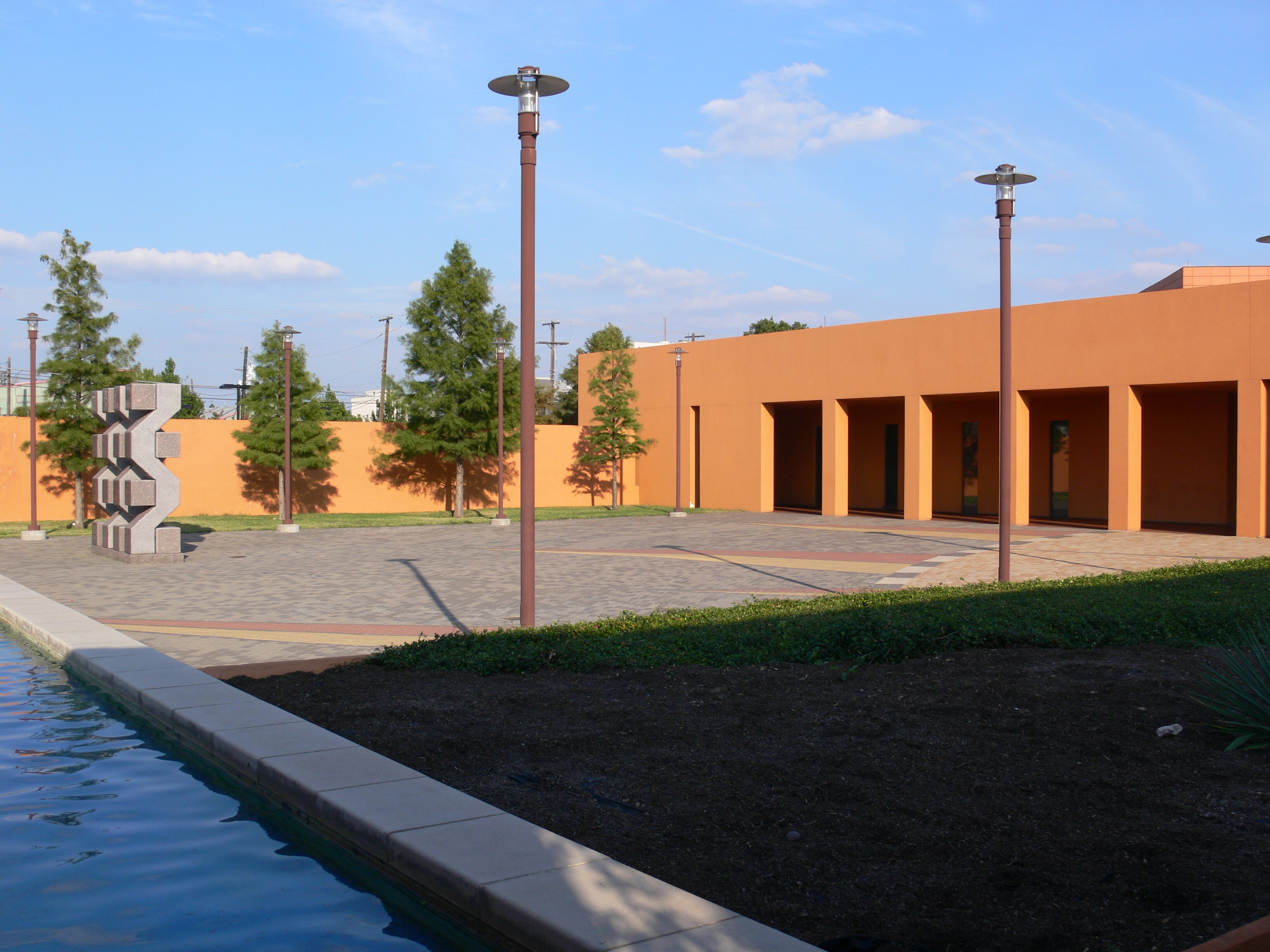 Latino Cultural Center, Dallas, Texas